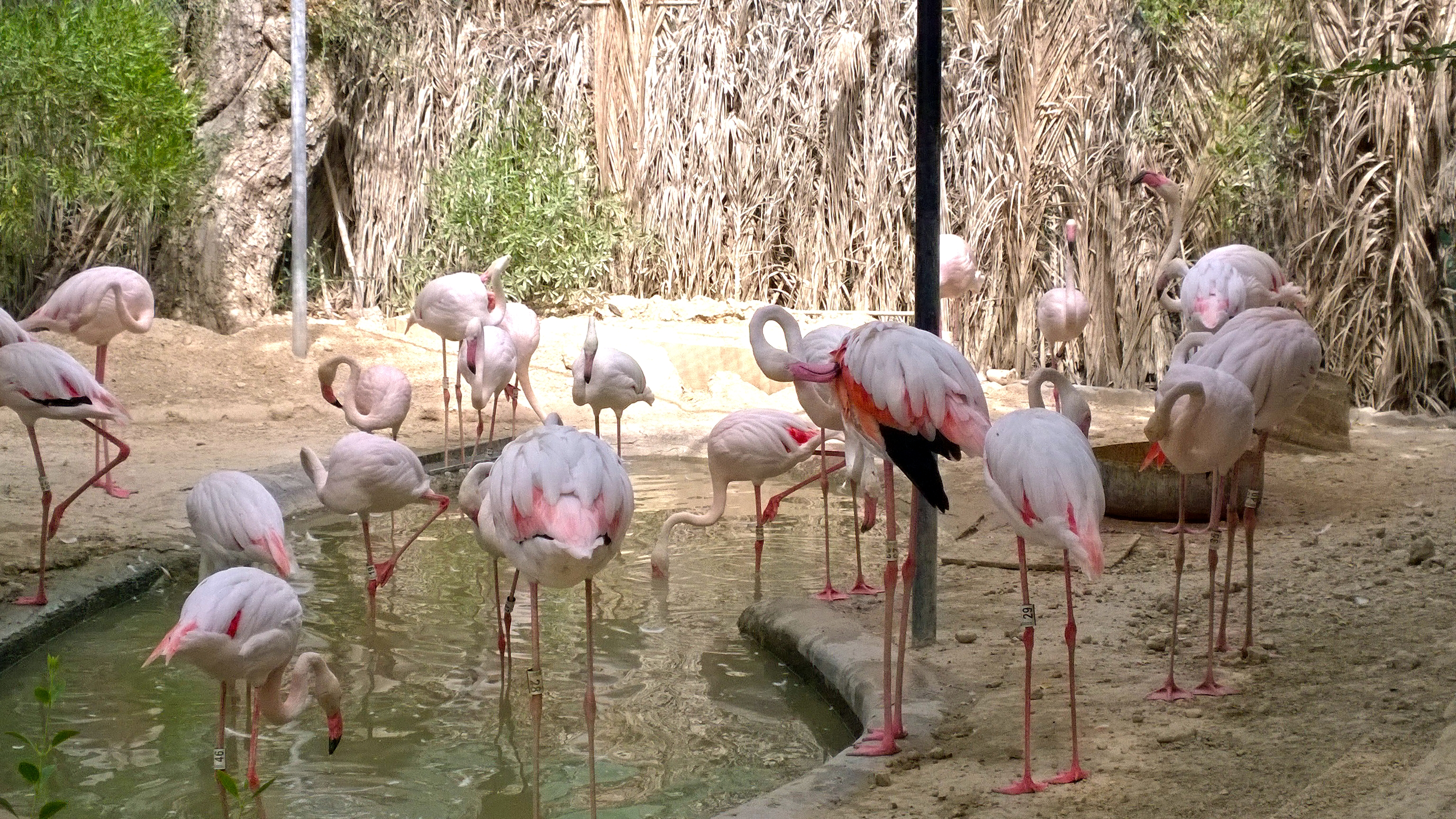 Flamingos at Dubai Zoo.